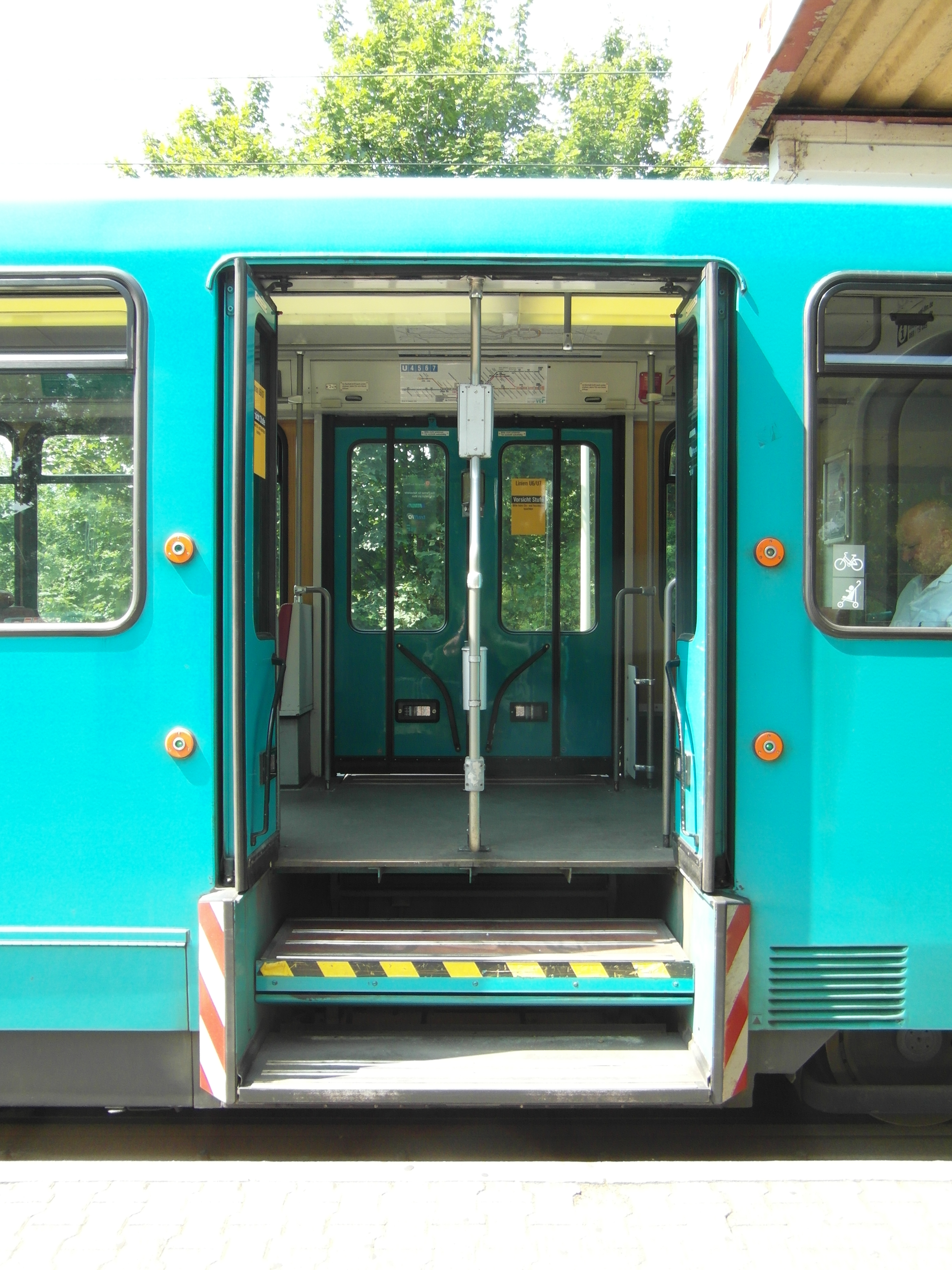 Stadtbahn Frankfurt am Main - Linie U5